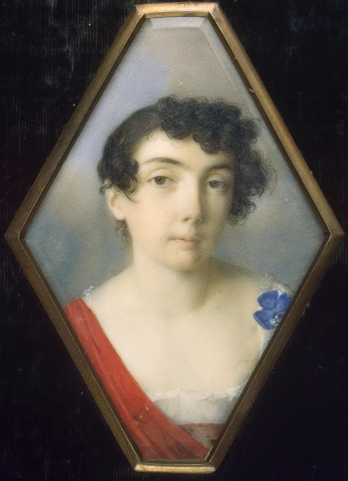 Анна Михайловна Хитрово, дочь генералиссимуса Кутузова.